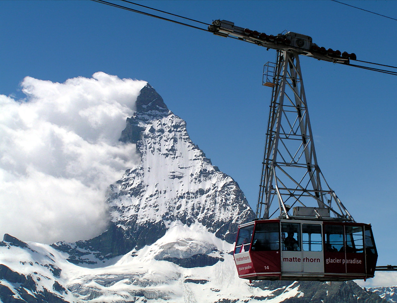 Gondel am Matterhorn